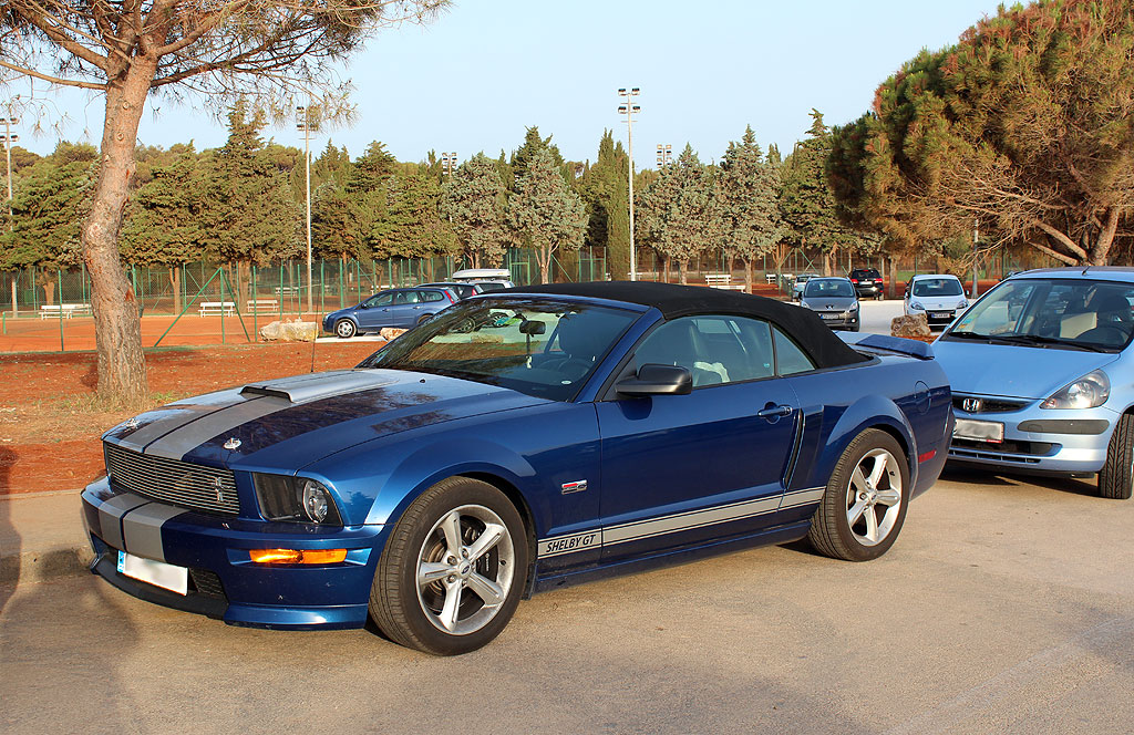 Shelby GT (Croatia 2012)